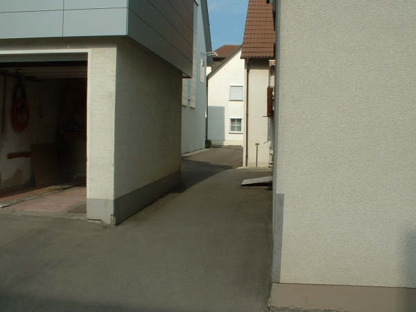 Former Jewish quarter, Laupheim